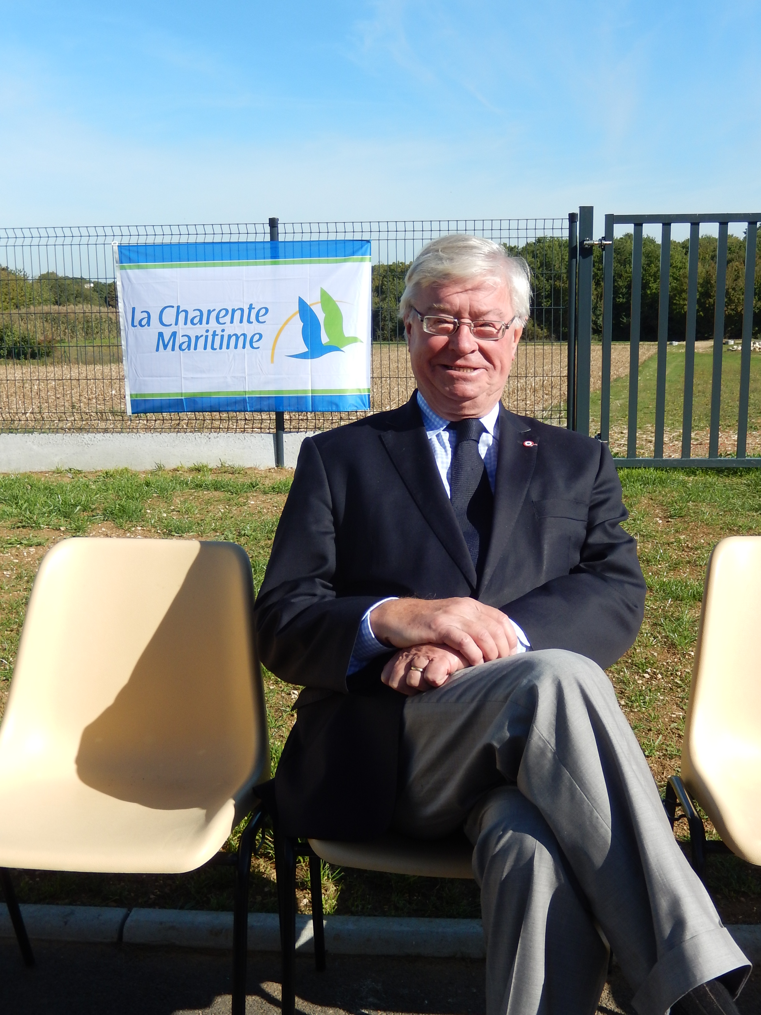 Le député français Didier Quentin, le 7 octobre 2017 à Plassay.